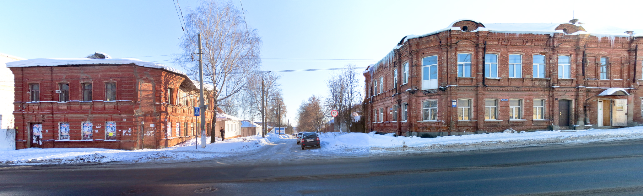 Дома мещан Беньковских (Курск, ул. Красной Армии, 80) и купца М. А. Кудрявцева (Курск, ул. Красной Армии, 82)